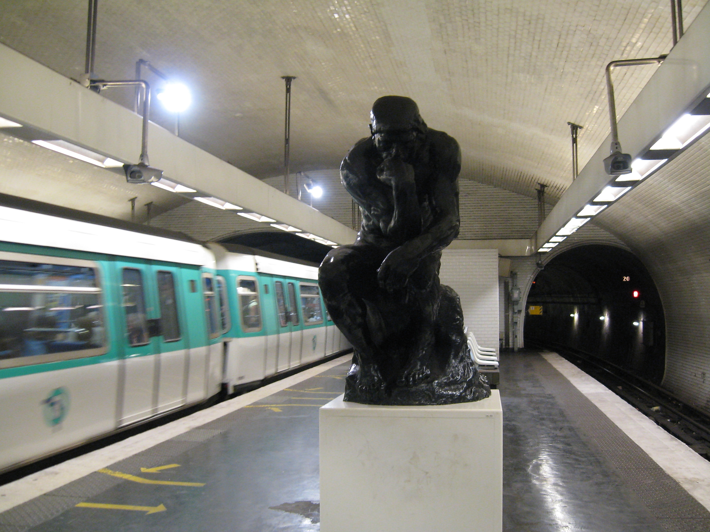 Varenne